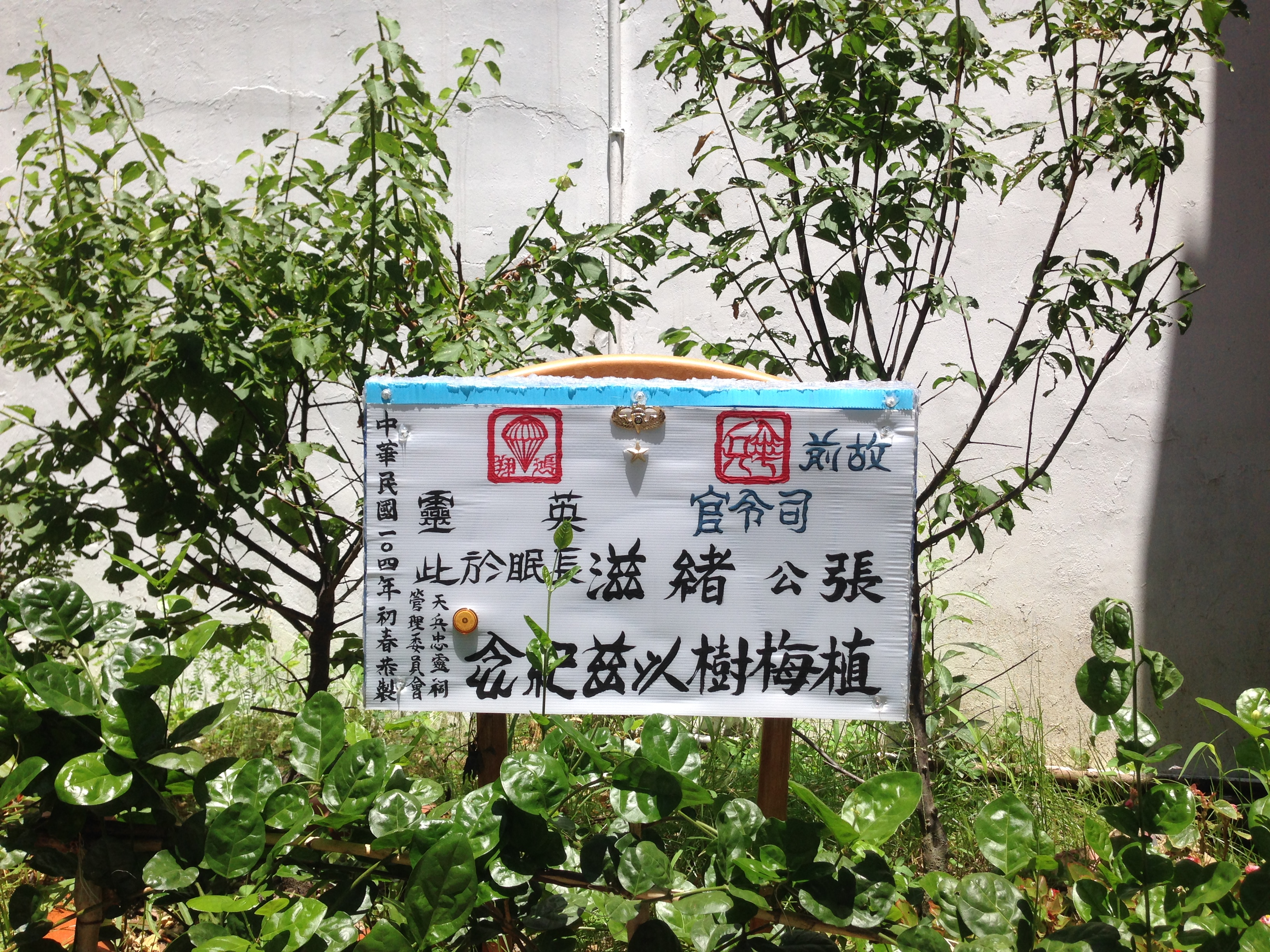 中文（台灣）: 天兵忠靈祠告示